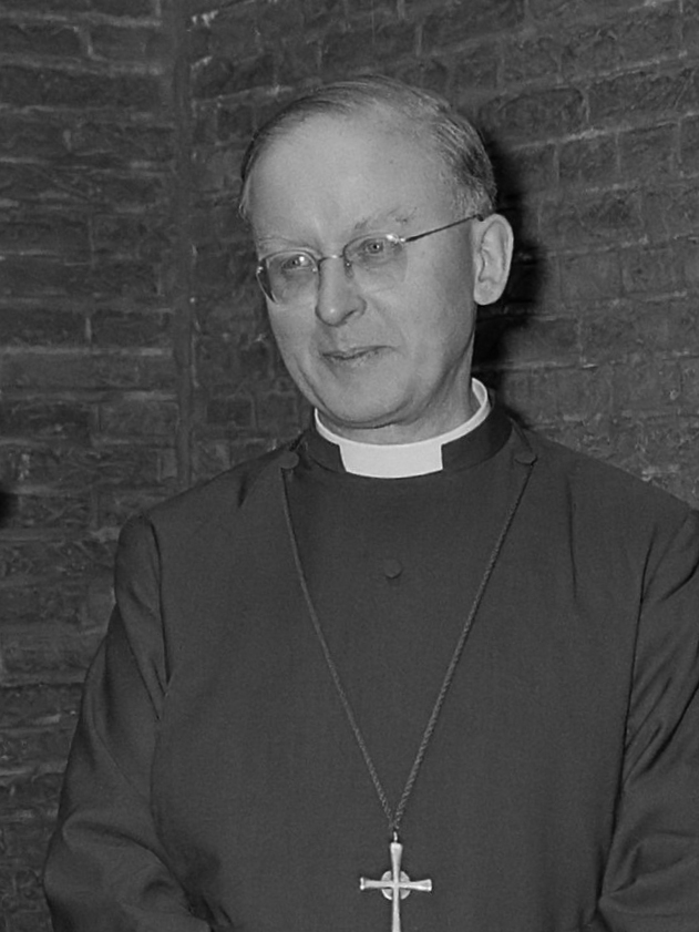 Aartsbisschop van York (Engeland) gedenkplaat onthuld op Begijnhof, dr. F. D. Donald Coggan tijdens de onthulling